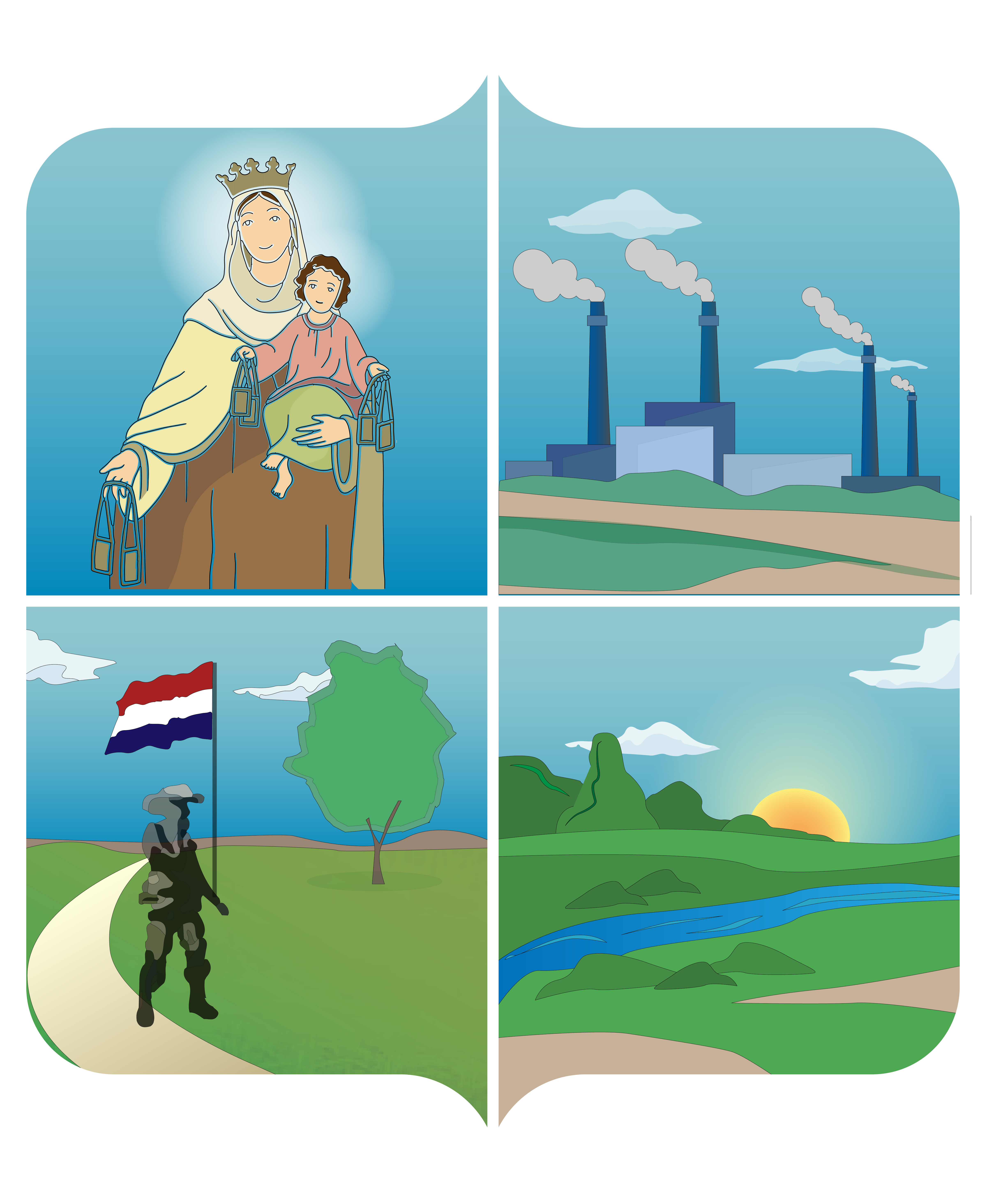 Escudo